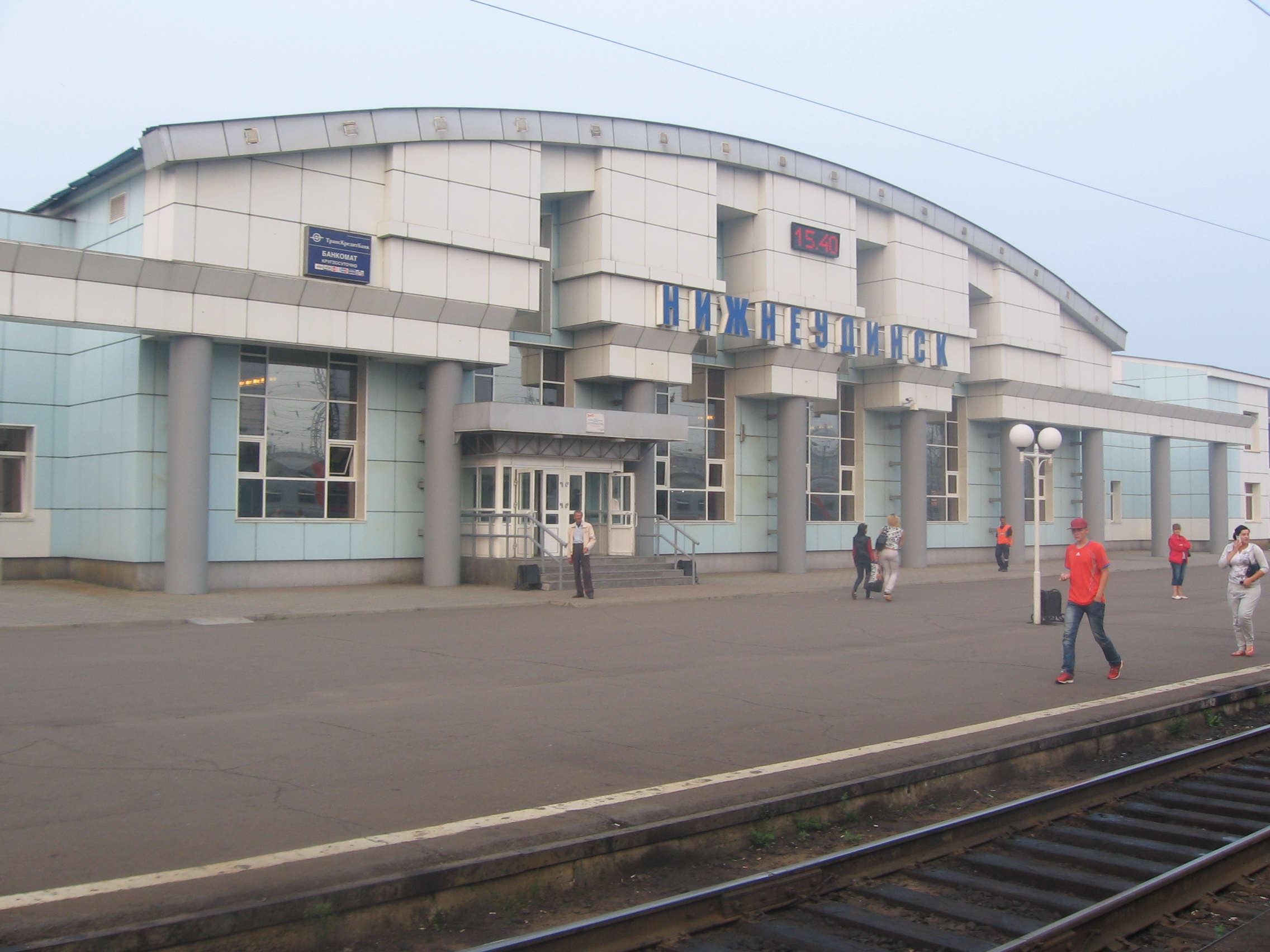 г.Нижнеудинск